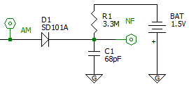 Hüllkurvendetektor mit Halbleiterdiode und Vorspannung